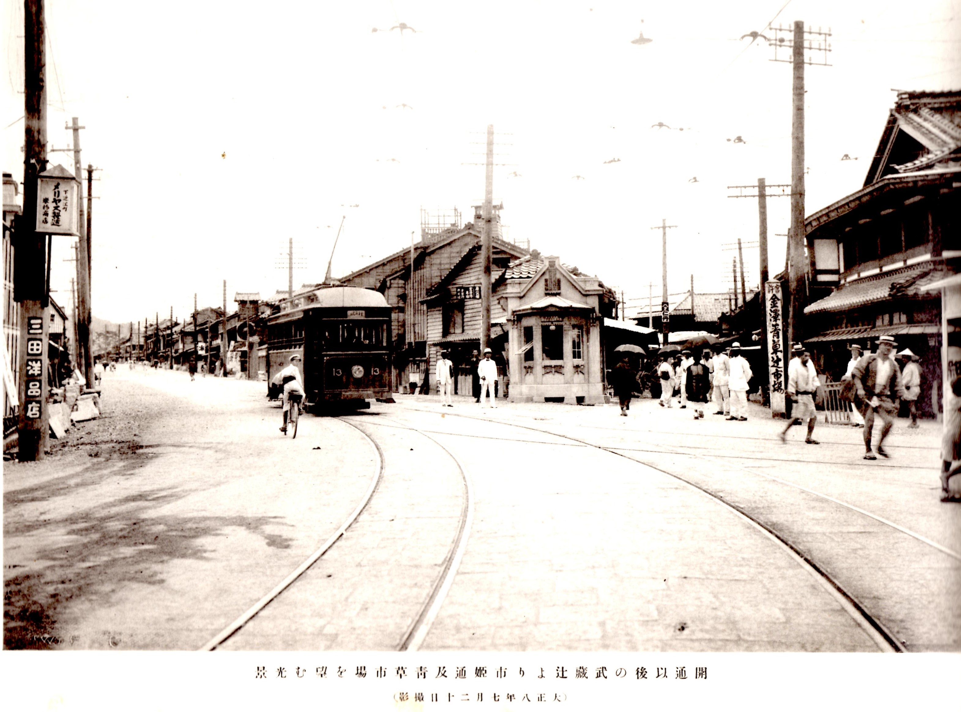 原題は「開通以後の武蔵辻より市姫通及青草市場を望む光景」。大正8年7月20日撮影。